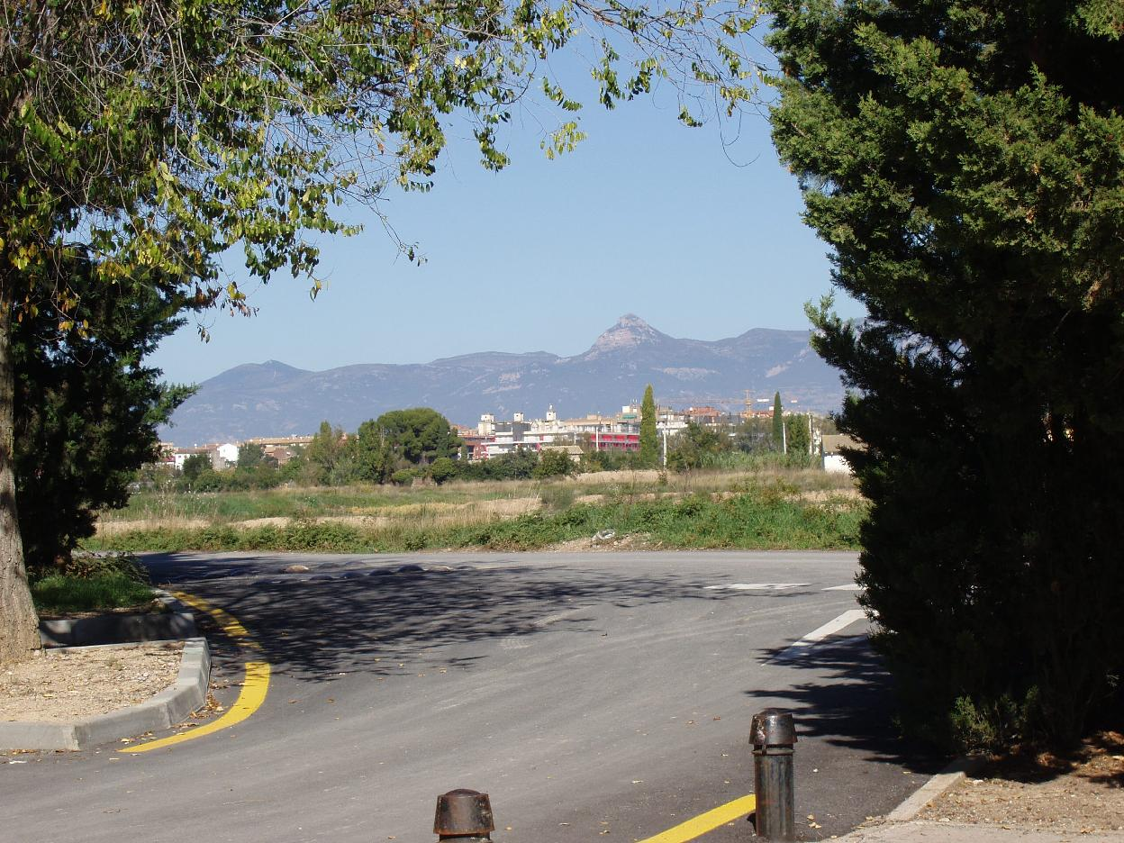 Provincia de Huesca, España.